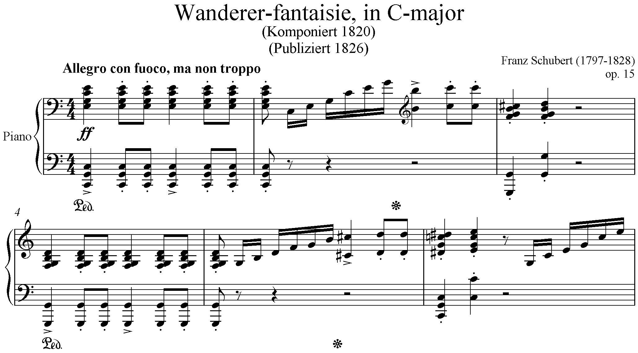 6 First bars of Schuberts "Wanderer" Fantasie